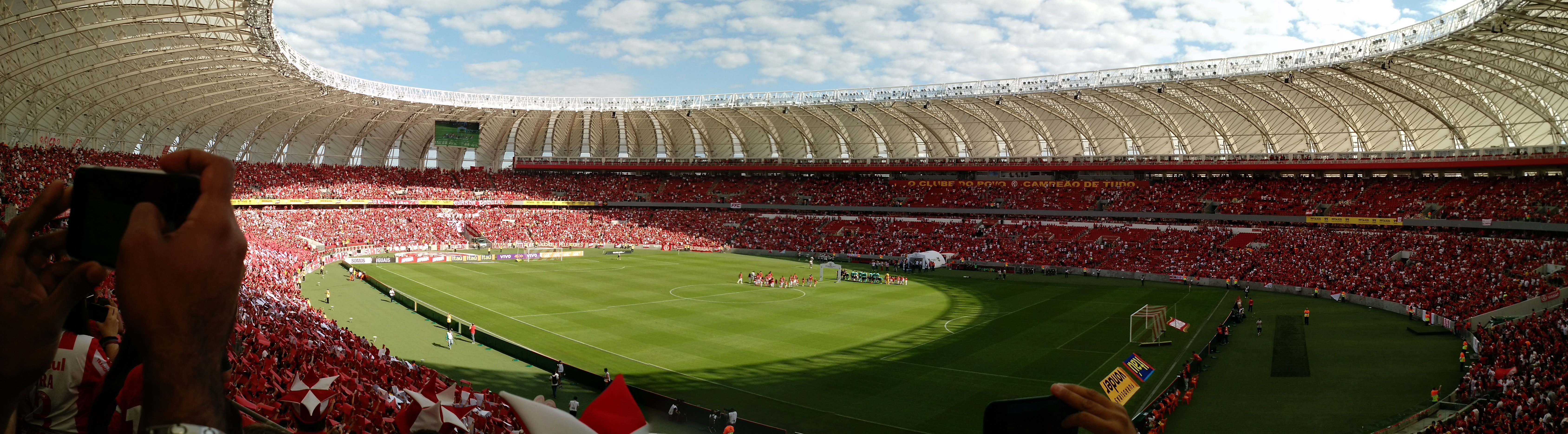 Estádio Beira-Rio, Porto Alegre - Brasil.